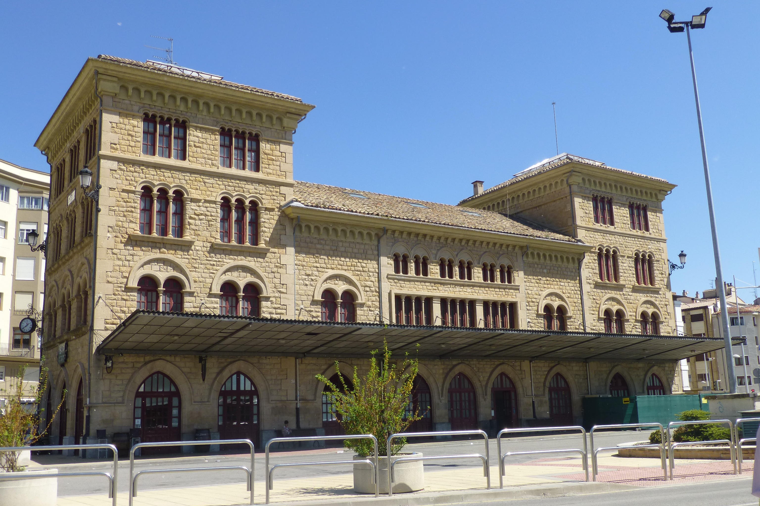 Antigua estación del ferrocarril Vasco-Navarro en Estella (Navarra España) hoy estación de autobuses.